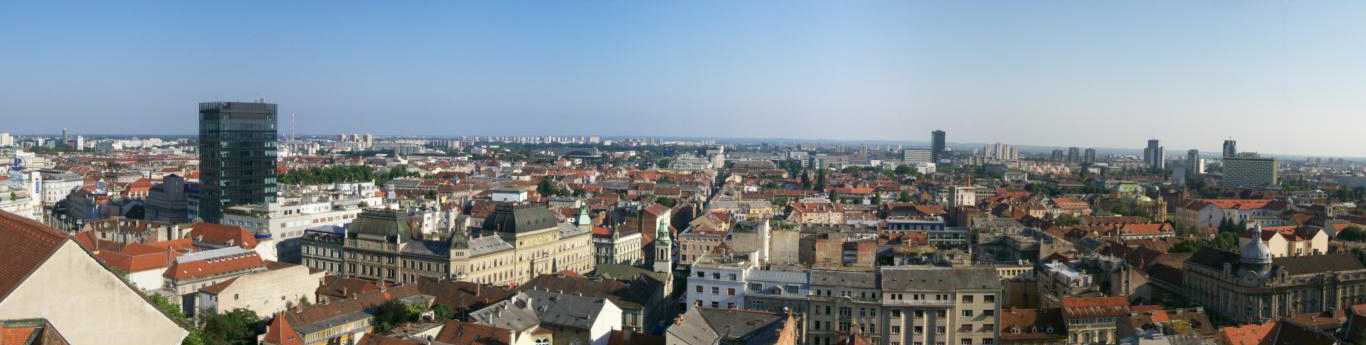 Panorama Zagreba